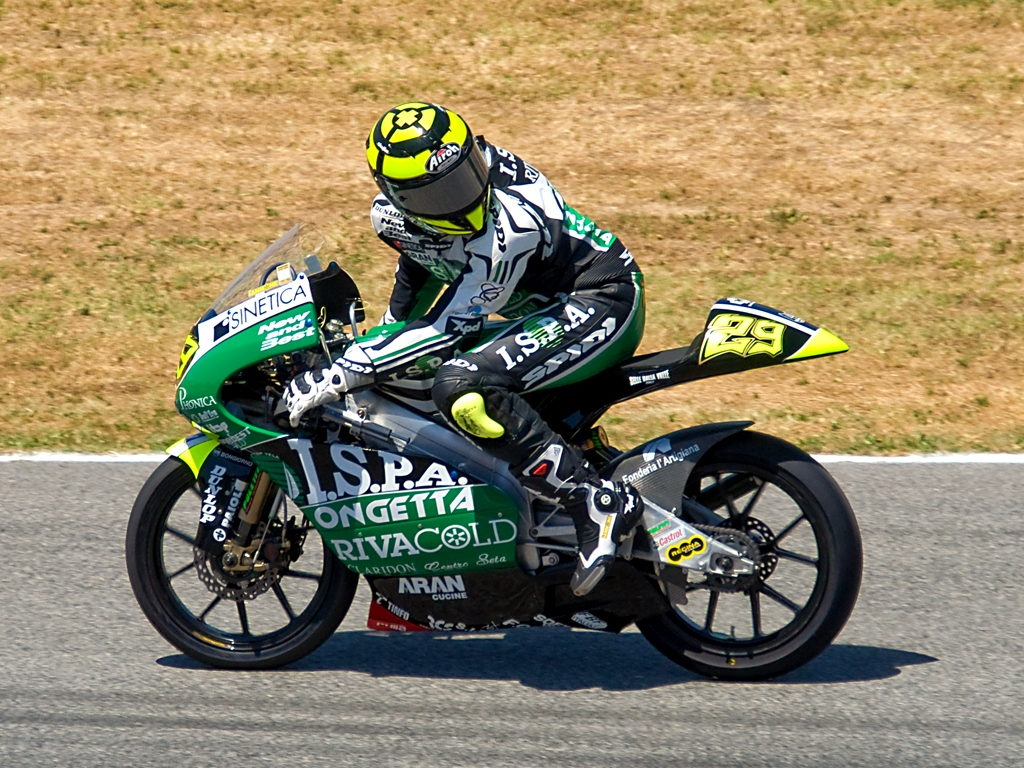 Nikon D90 + Sigma 18-200 DC OS HSM 1/800s - F/10 - 135mm - ISO400